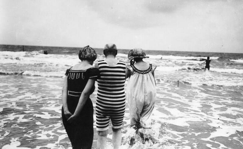 So badete man damals! Soll man's wagen? Vorsichtig schreiten Vater, Mutter und Tochter in Borkum 1910 in die See.